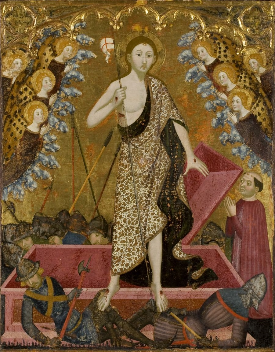 La obra representa la Resurrección de Jesucristo, y forma parte del retablo que Jaume Serra pinto entre 1361 y 1362 con destino a la capilla que fray Martin de Alpartir poseía en el monasterio del Santo Sepulcro de Zaragoza.